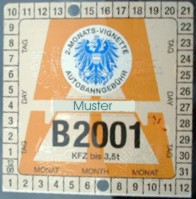 Autobahnvignette Oesterreich - Austria